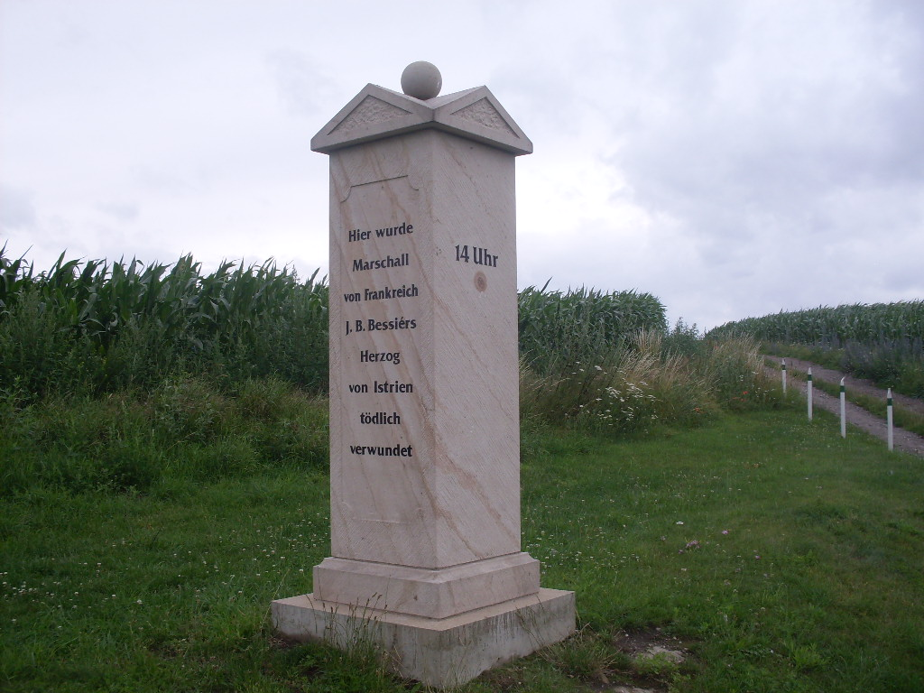 Gedenkstein Marschall Bessières bei Rippach (Zustand 2011)